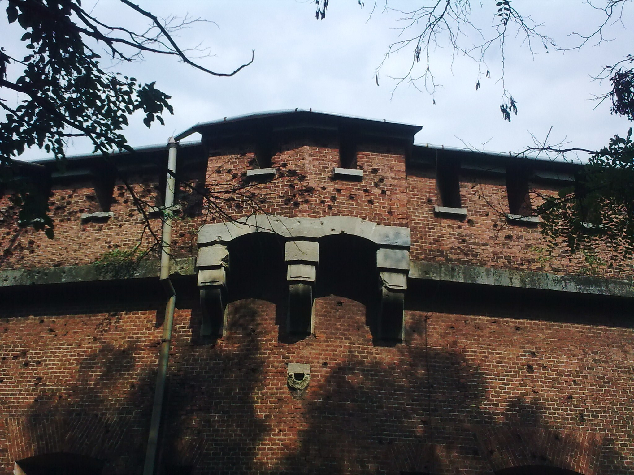 Baszta w cytadeli we Lwowie, magazyn książek